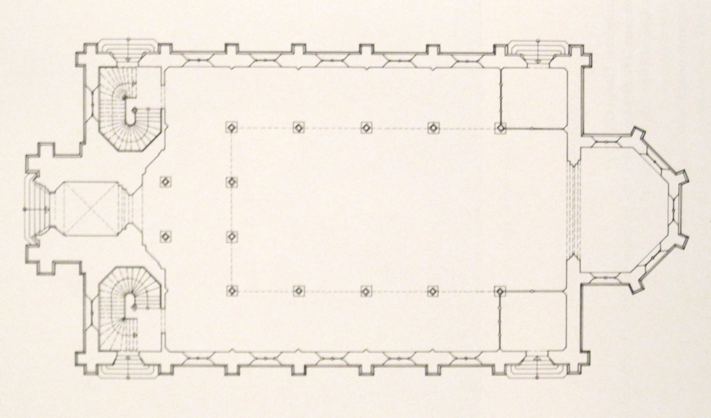 Grundriss der Erlöserkirche in Mannheim-Seckenheim